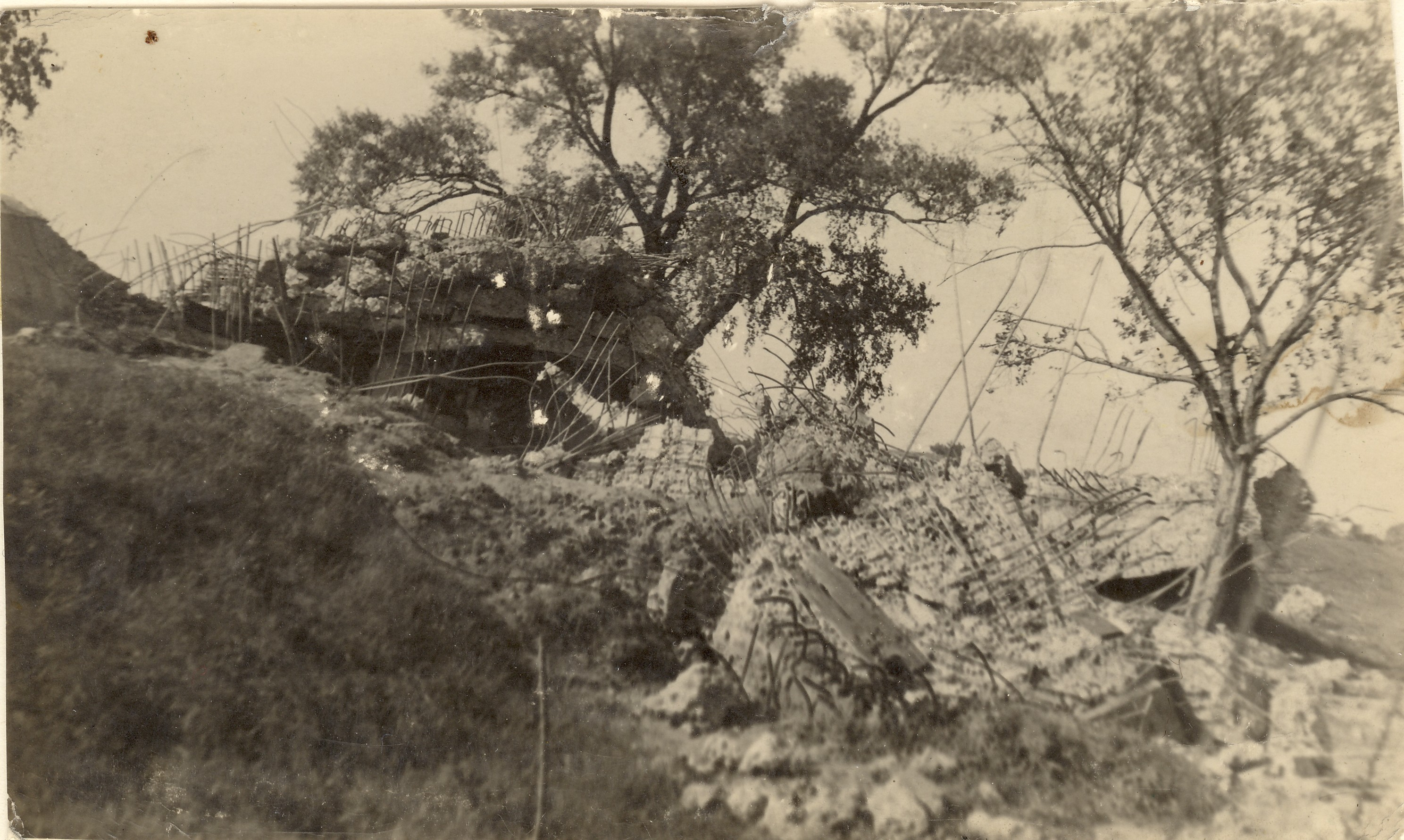 Tzv. řopíky, součásti opevnění Pražské čáry, zlikvidovala německá armáda v roce 1939